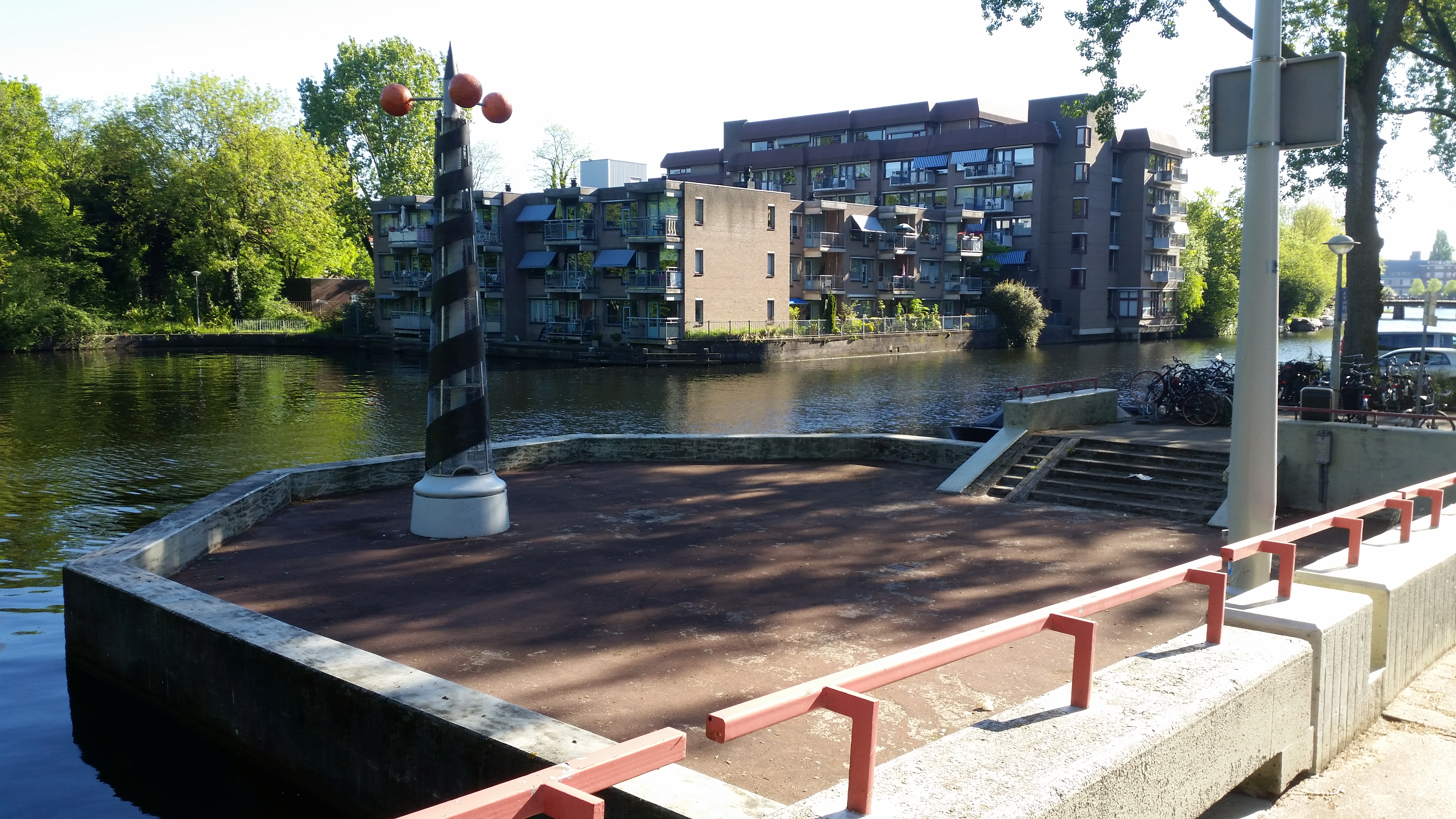 Terras naast brug 682, Postjeswetering, Amsterdam, Vuurtoren met sinasappels van Hans van den Ban